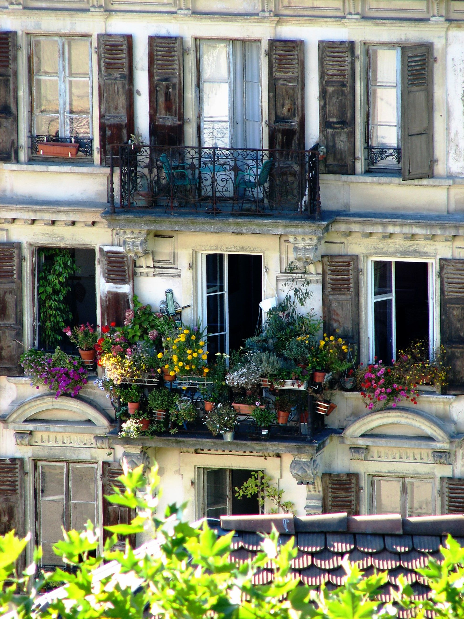 Hausfront in Lausanne